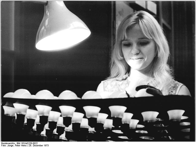 ADN-ZB-Junge-28.12.1973-ku-Berlin: Glühlampen aus dem "Narva"-Kombinat. Im Jahre 1973 haben die Werktätigen des VEB "Narva"-Kombinat, Berliner Glühlampenwerk, eine Vielzahl von Beleuchtungskörpern aller Art zusätzlich ausgeliefert. Unser Foto zeigt Petra Starr bei der Endkontrolle der "Birnen", die überall benötigt werden. Der Monat Januar 1974 soll nach der Verpflichtung des Kombinatskollektivs der 100. Monat kontinuierlicher Planerfüllung in allen Kennziffern werden. (Vergl. hierzu M1228-21N)"